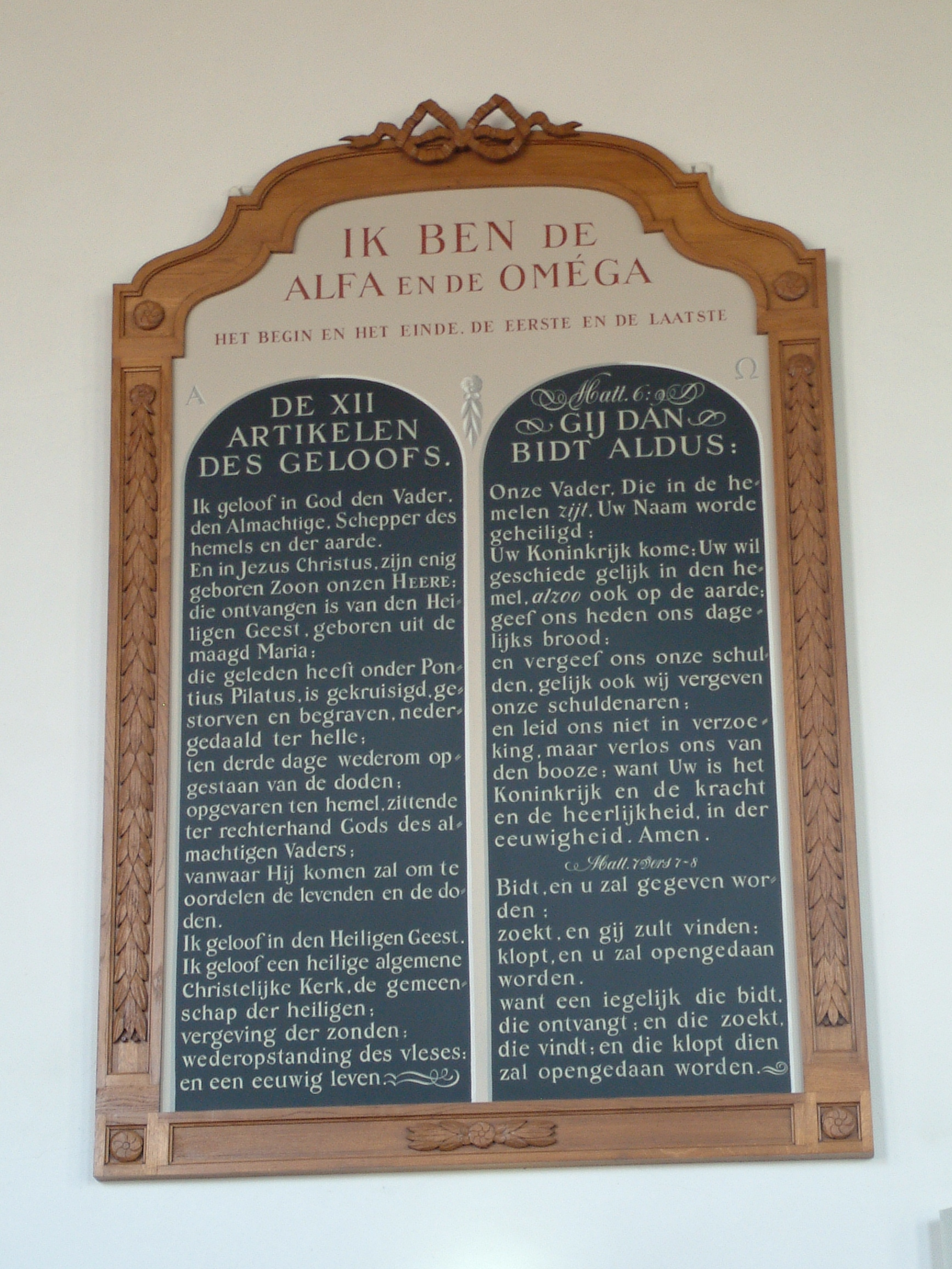 Hervormde Kerk Meerkerk, Testbord Noordzijde